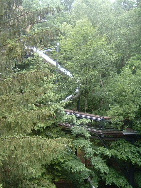 Baumwipfelpfad (Teil) in Fischbach bei Dahn in Rheinland Pfalz.